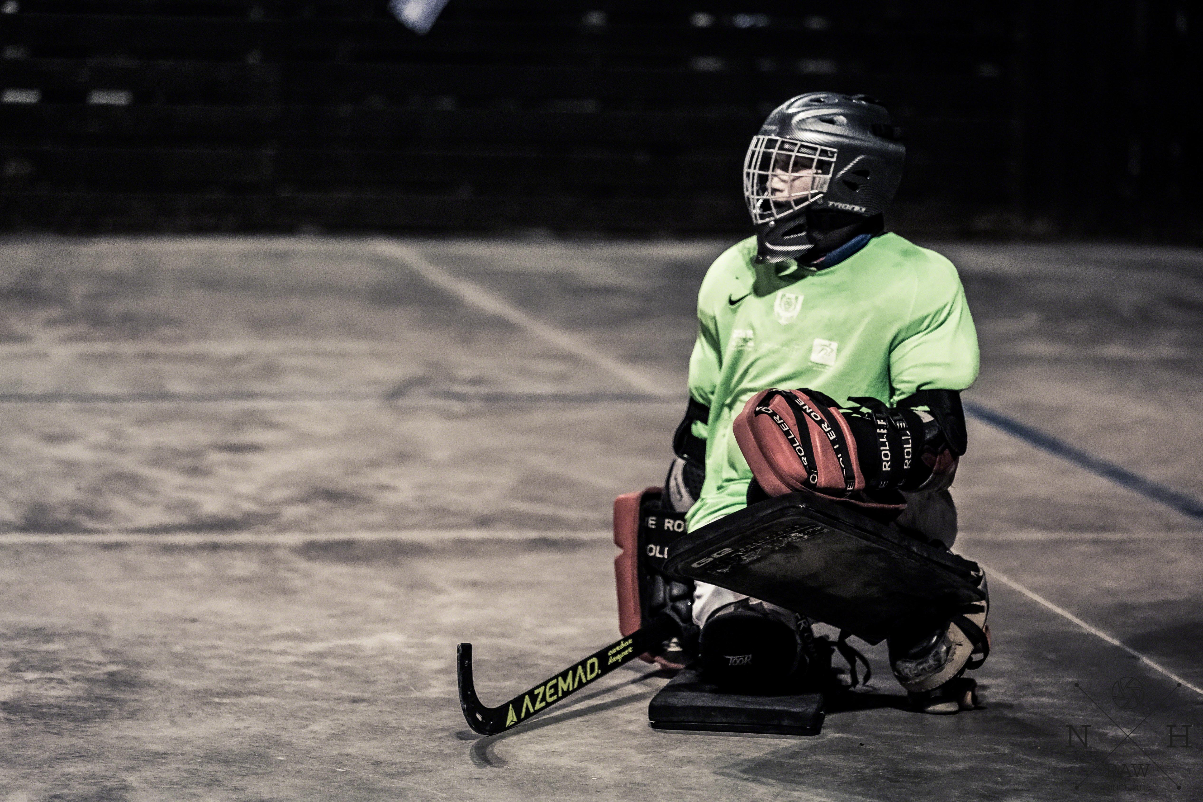 שוער קבוצת בית לחם שומר ע השער במהלך משחק